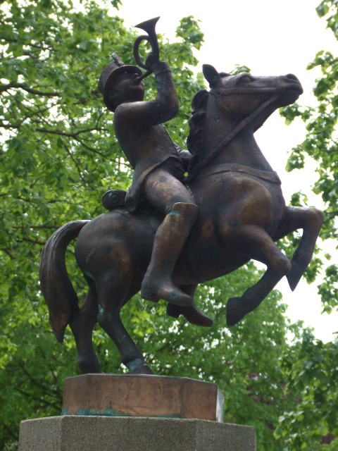 Diepoldshofen (Stadt Leutkirch), Dorfbrunnen mit Bronze-Figur eines Postreiters mit Posthorn